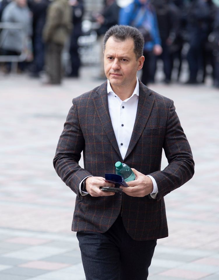 Батенко Тарас біля Верховної Ради України